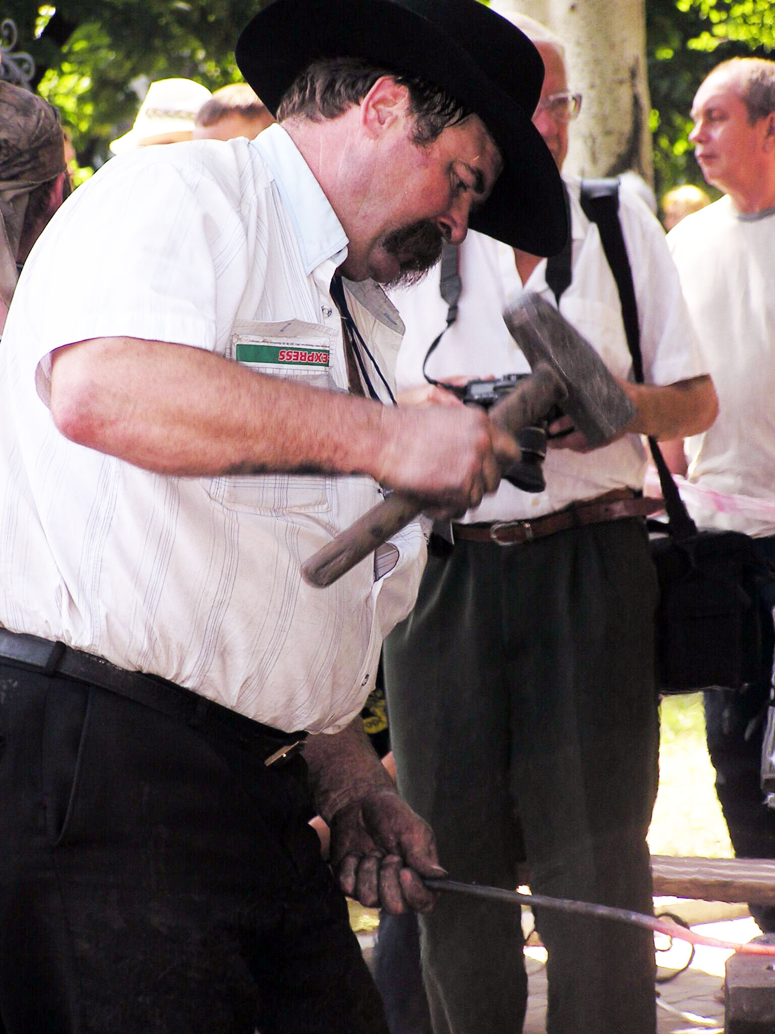 Сергей Каспрук. Донецкий парк кованых фигур и резных скульптур, международный фестиваль кузнечного мастерства